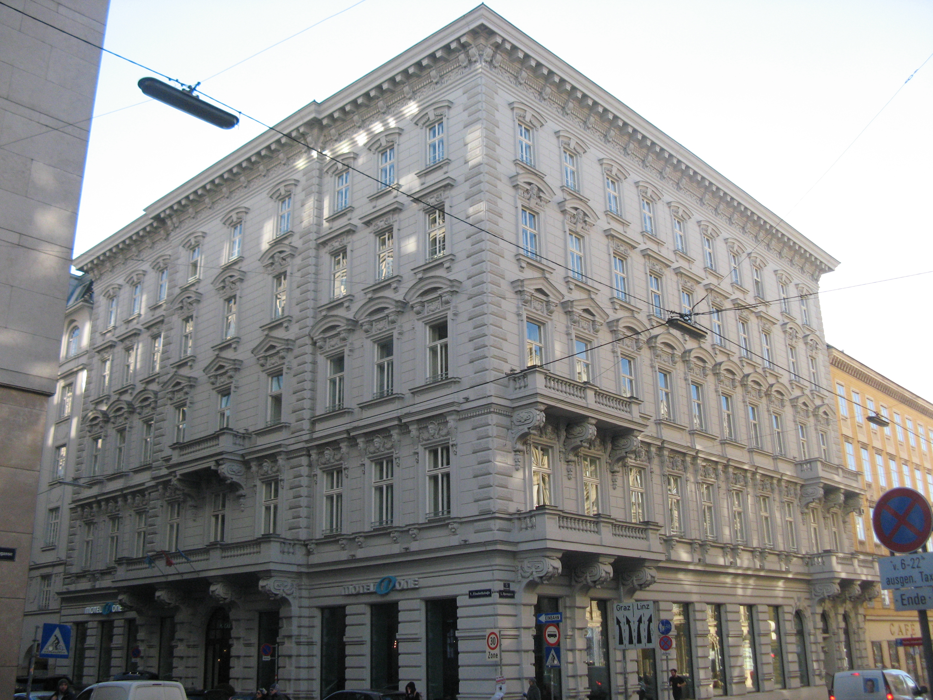 Wehli-Palais (1869-70), von Ludwig Zettl, Elisabethstraße 5, Wien-Innere Stadt